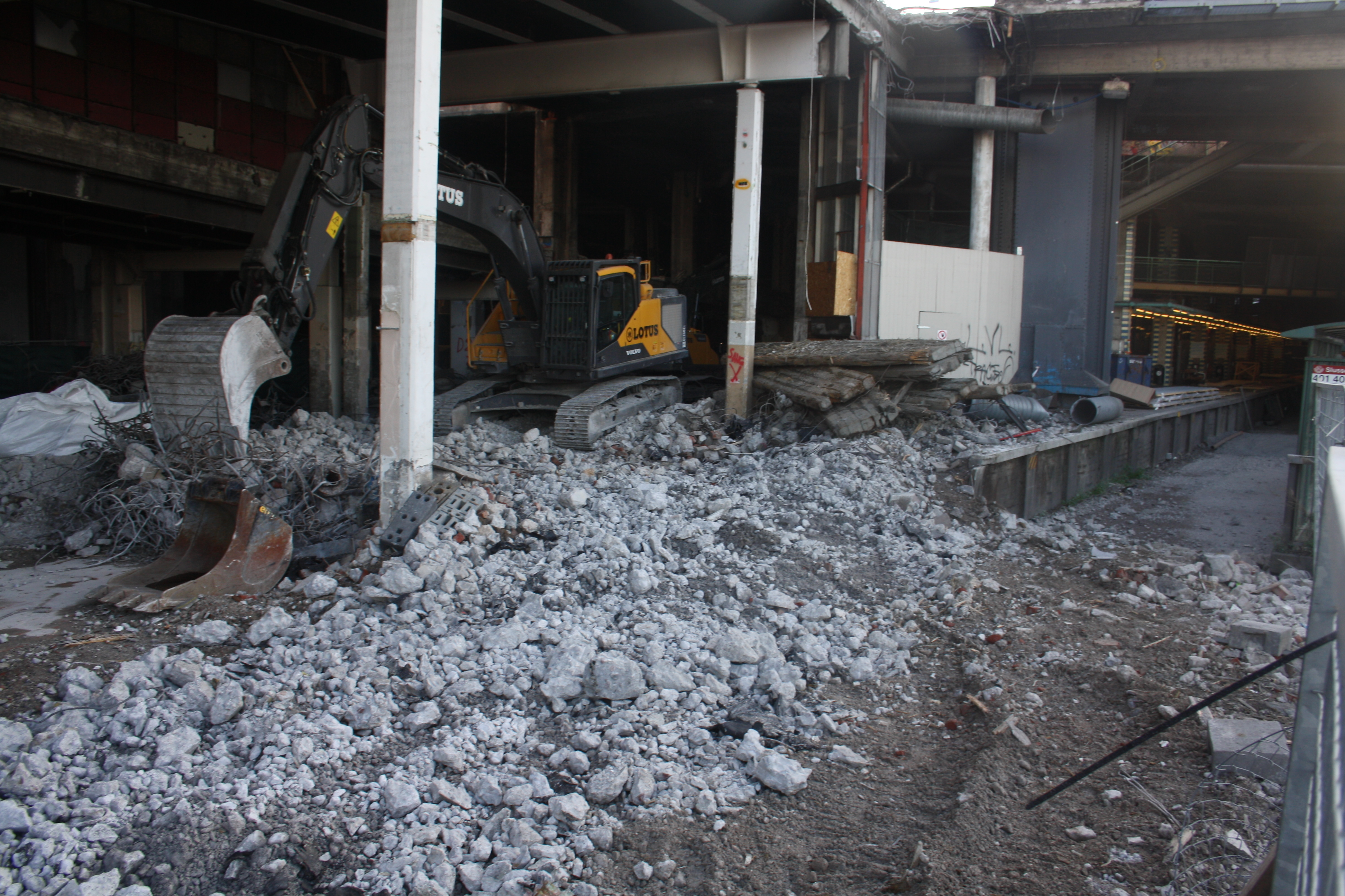 Rivningen av Slussen